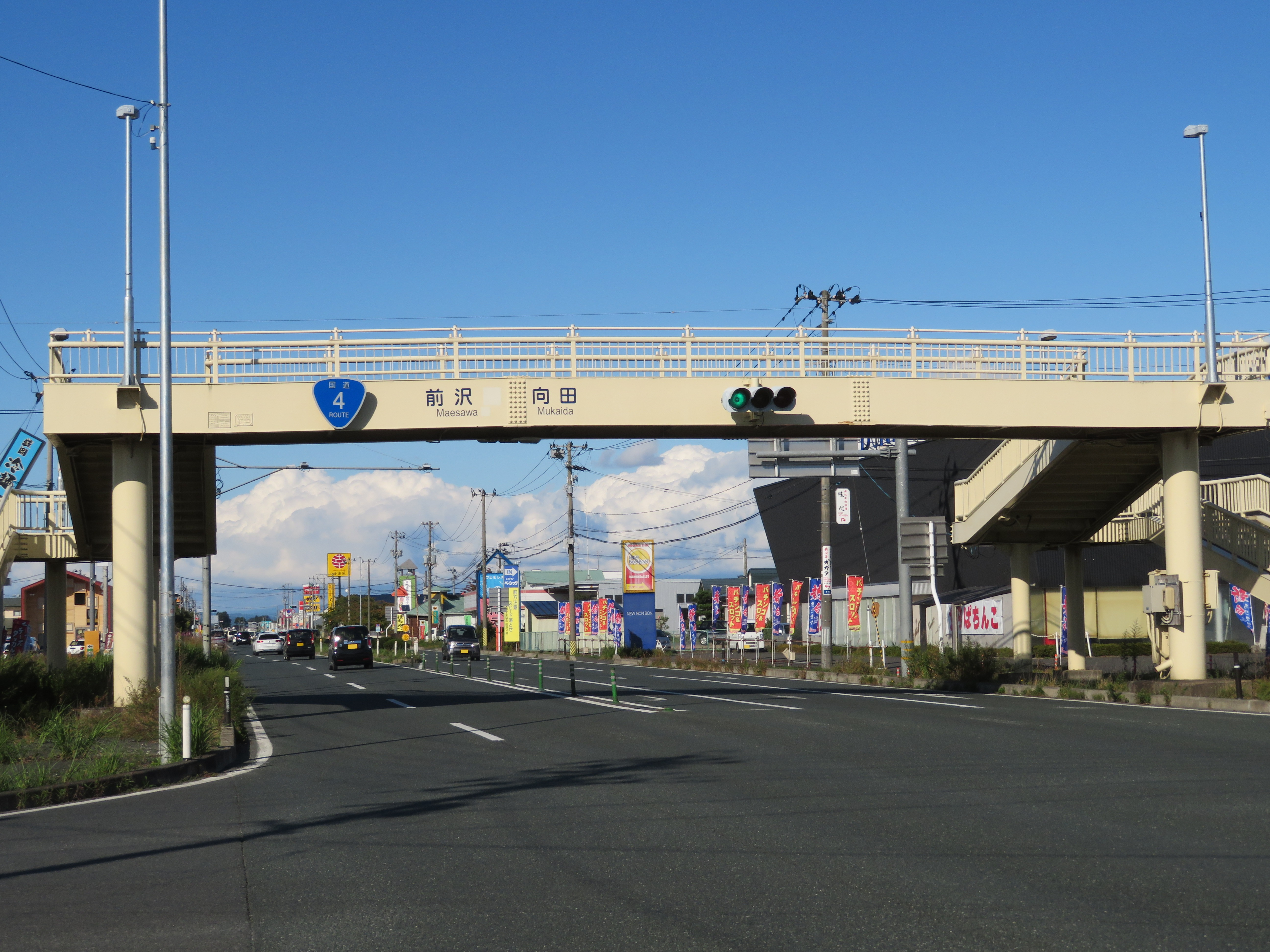 国道4号線 前沢バイパス岩手県奥州市前沢向田１丁目付近（北上方面を撮影）